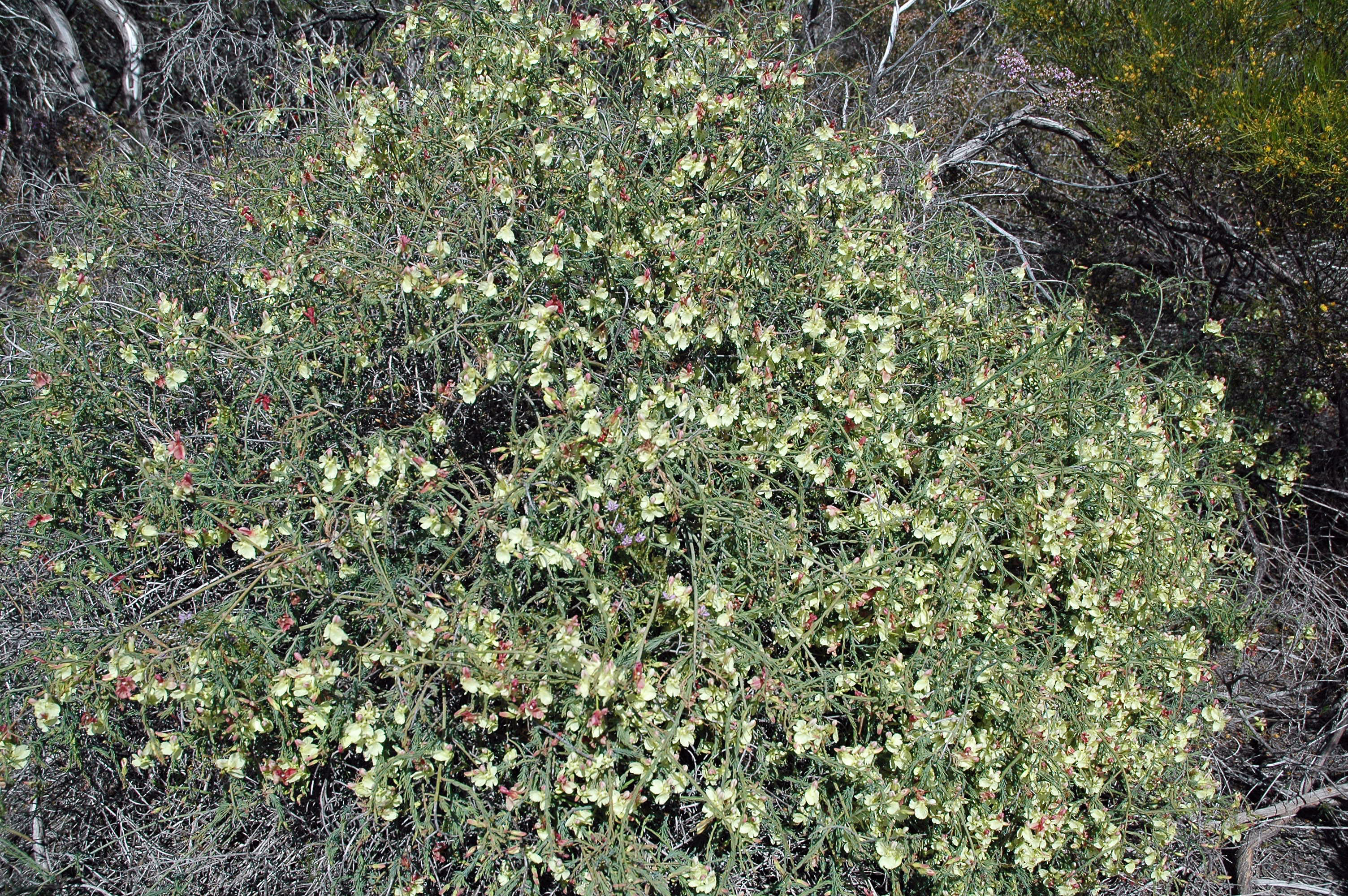 Yellow Lechenaultia, Lechenaultia linarioides, Western Australia